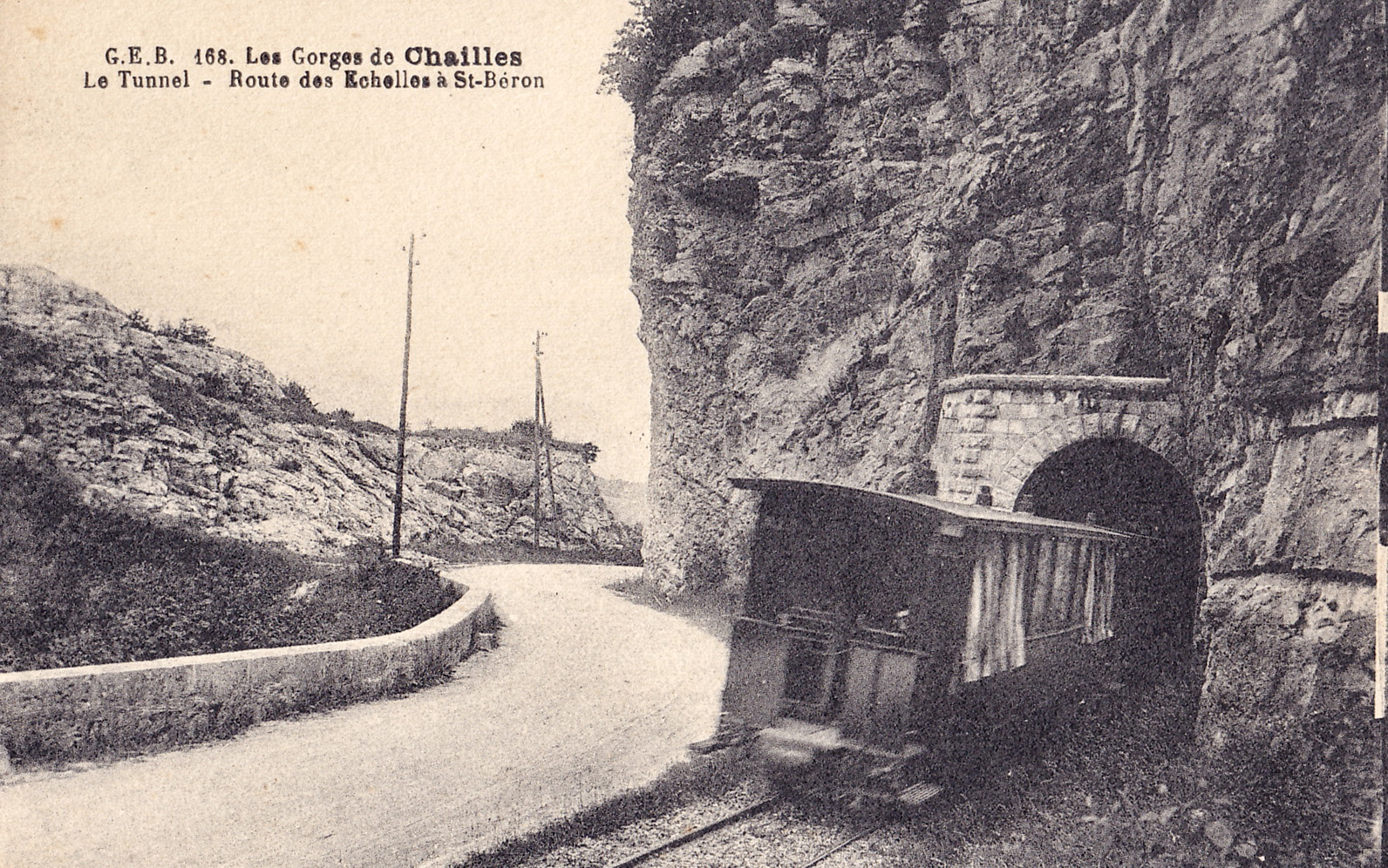 Carte postale ancienne éditée par GEB; n°168 : Les GORGES DE CHAILLES - Le Tunnel - Route des Echelles à St-Béron.